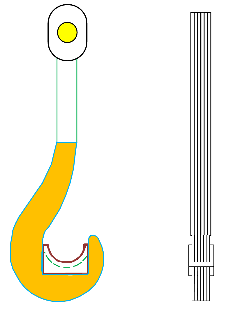 Пластинчатый грузовой крюк - однорогий